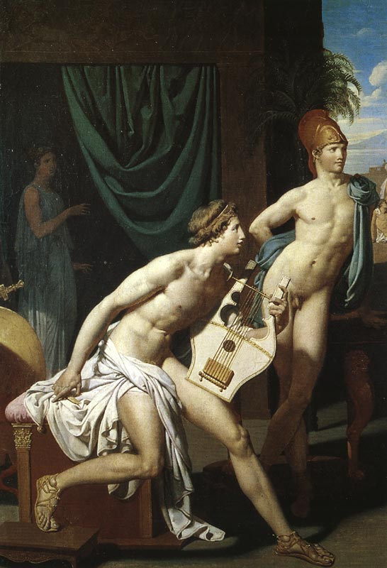 detail